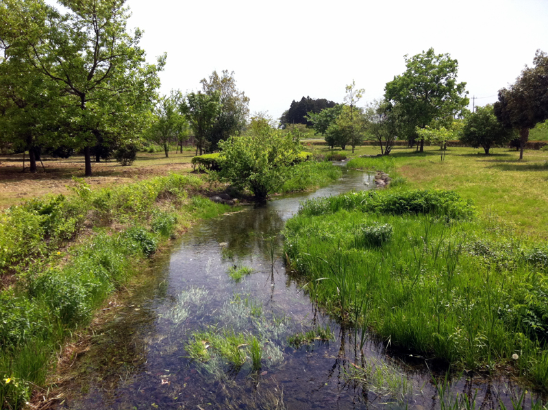 蓼沼公園 2011年5月